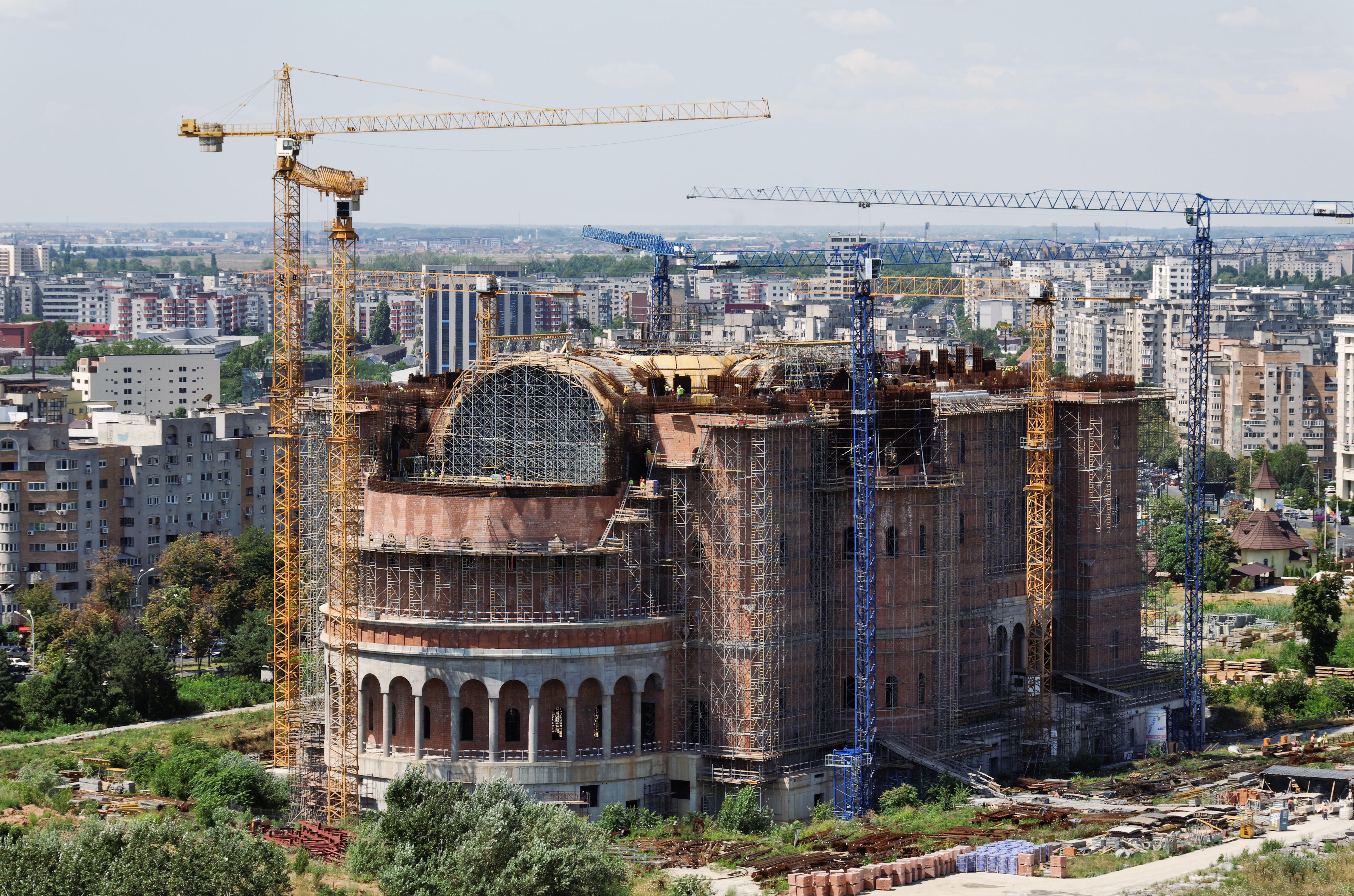 Chantier de la Cathédrale du salut de la nation roumaine vu depuis la terrasse du Palais du Parlement de Bucarest